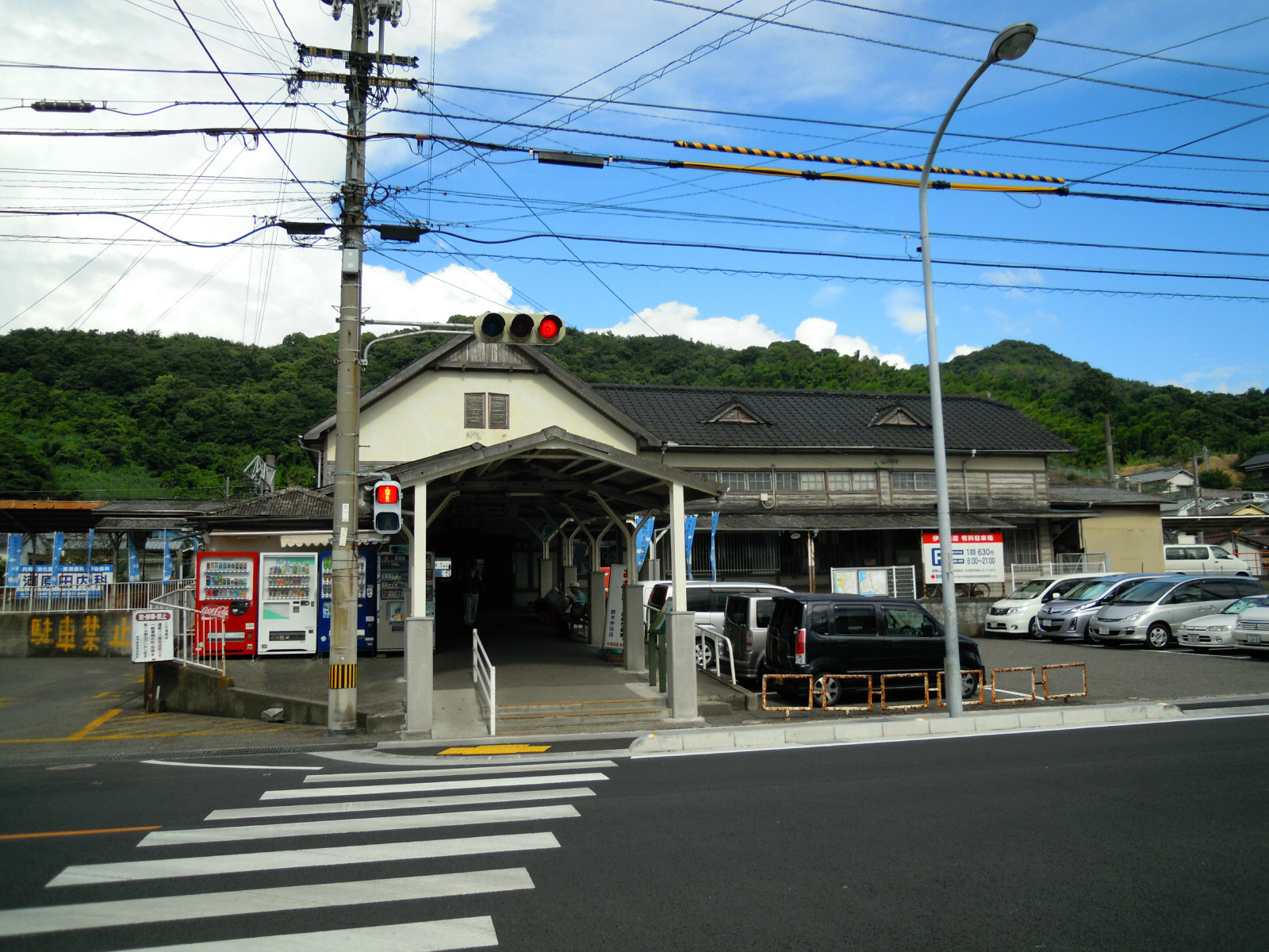 Iyo Railway Takahama station